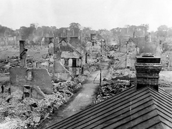 Images des vestiges du grand incendie de 1908 tirées de la collection d'archives du Séminaire de Trois-Rivières